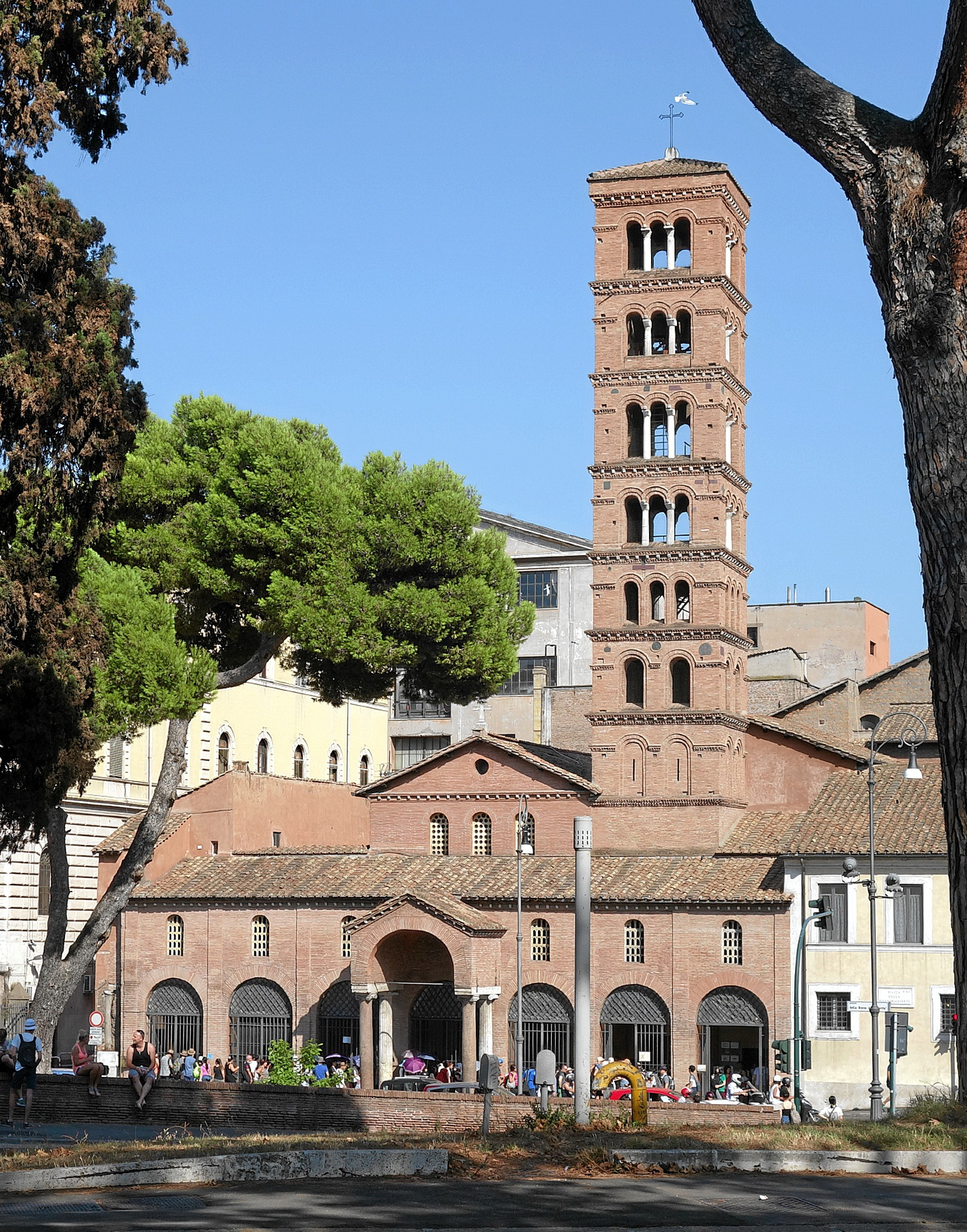 Базилика Санта-Мария-ин-Космедин в Риме